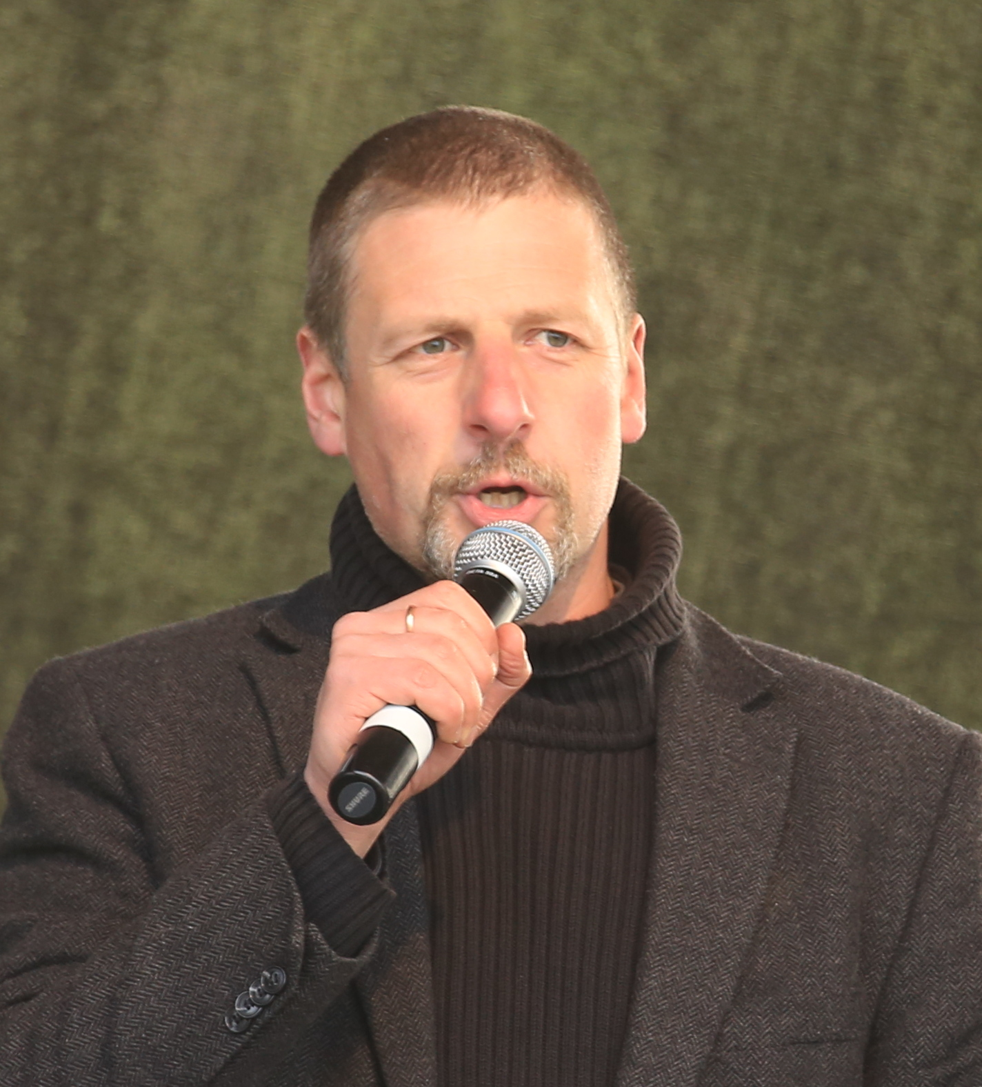 Götz Kubitschek, Pegida-Veranstaltung am 13.04.2015